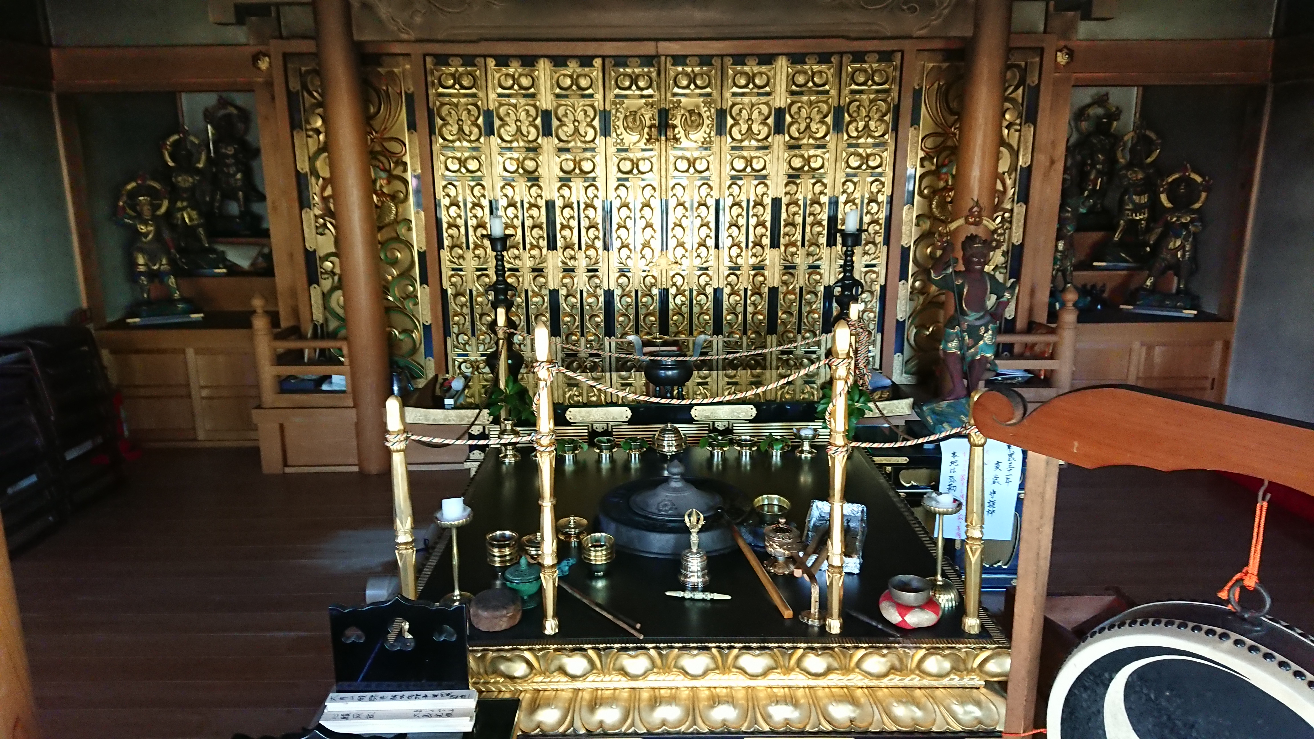 高蔵寺にある馬頭観音像が祀られている堂である。